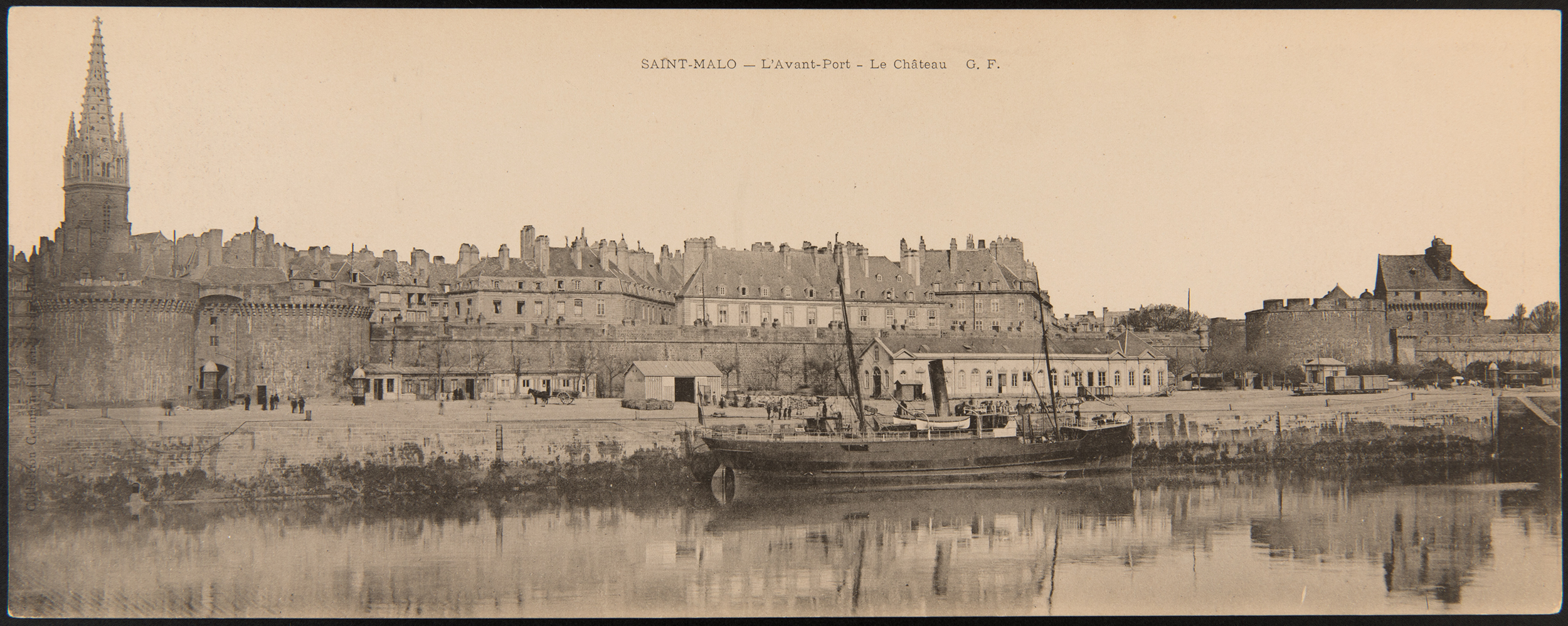 Carte postale de Saint-Malo vers 1900, l'avant port , la Grand'porte, le chanteau. Collection du musée de Bretagne